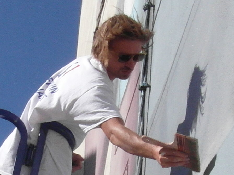 Seth à Fontaine (Isère) en juin 2017